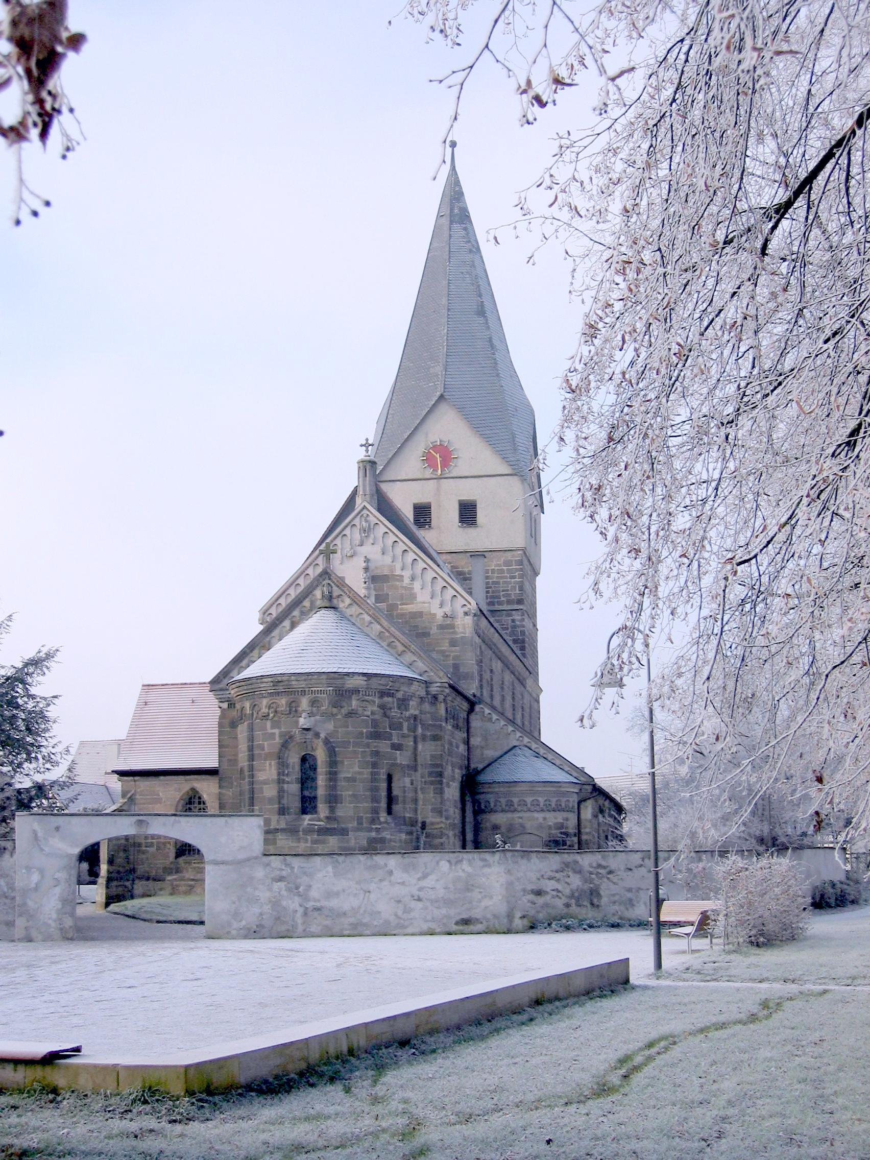 Stiftskirche, Faurndau